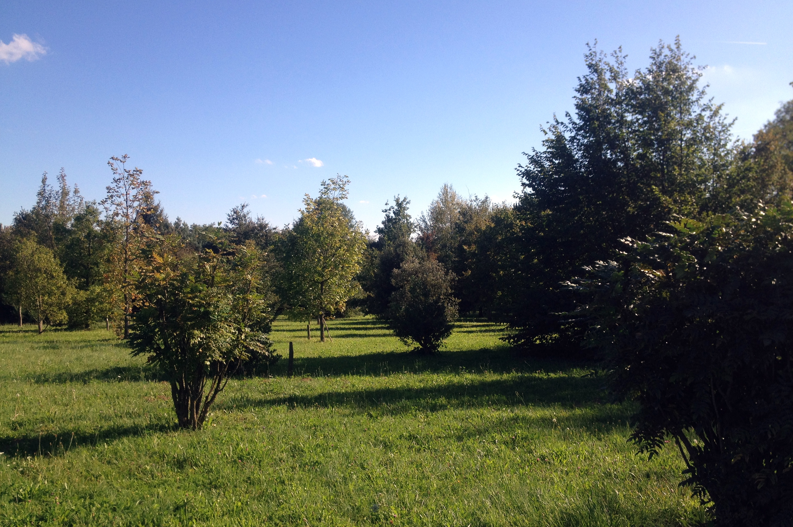 Arboretum of Beynost.